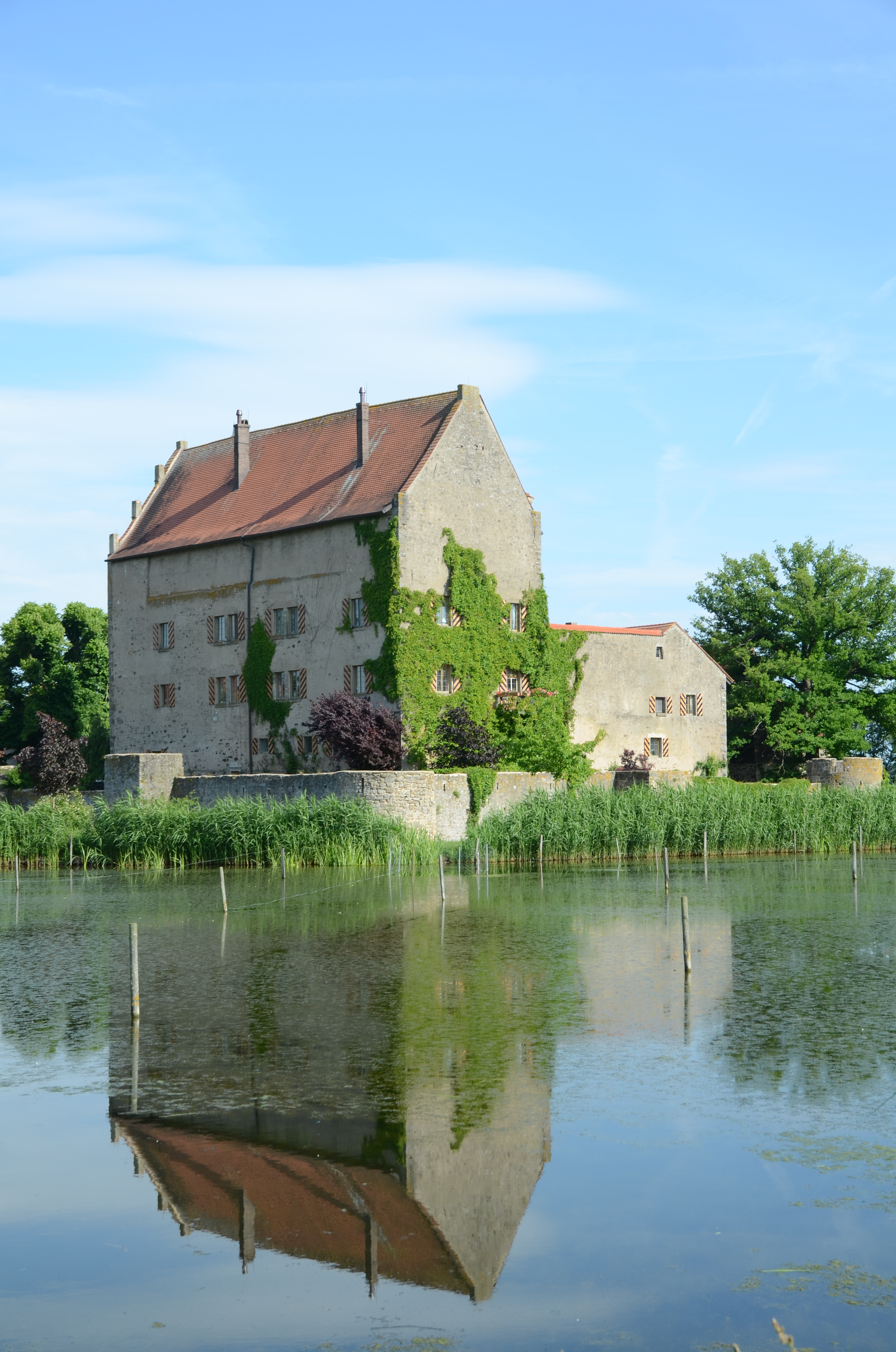 Schloss SommersdorfThis is a photograph of an architectural monument.